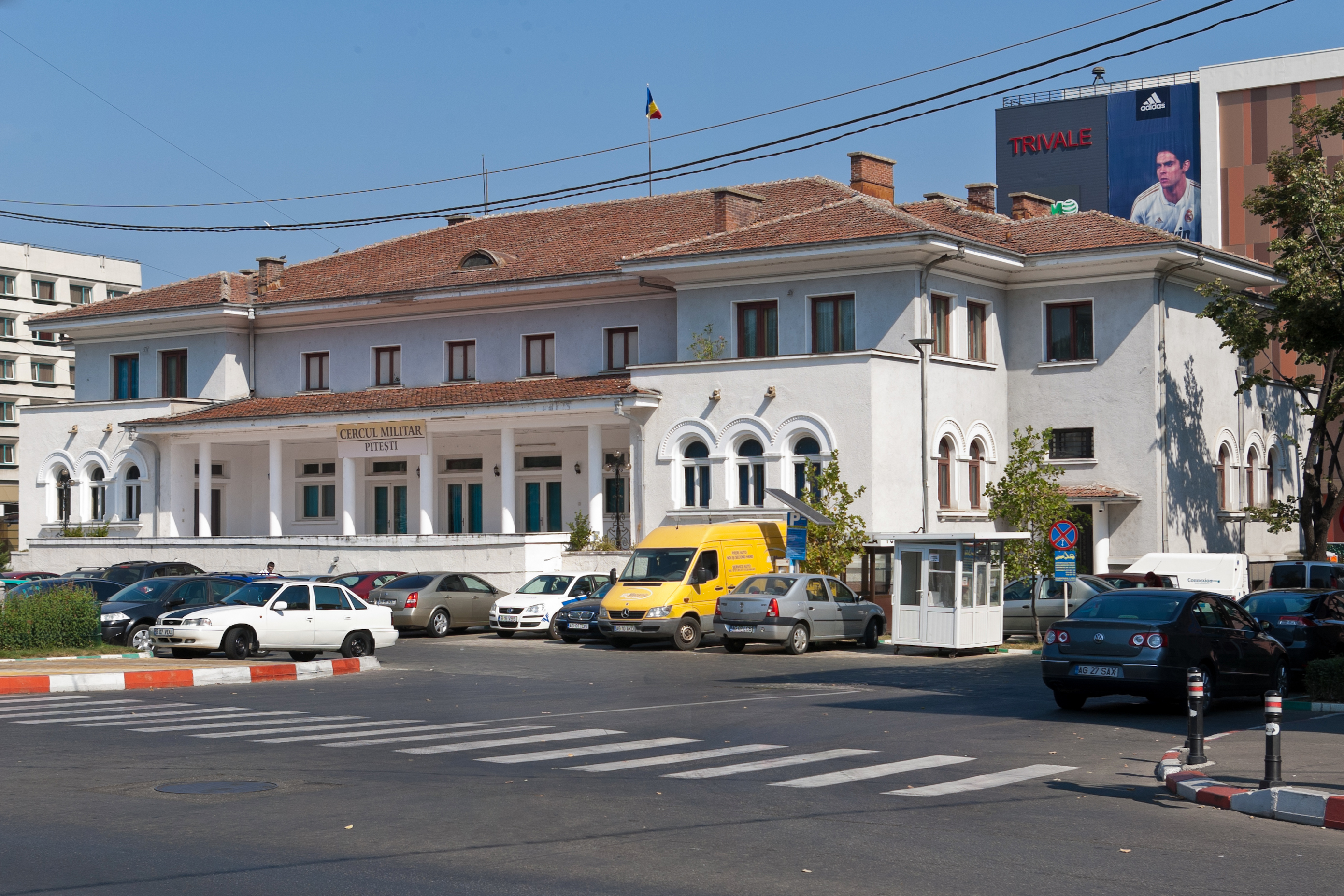 Fotografia prezinta Casa Armatei vazuta dinspre S.